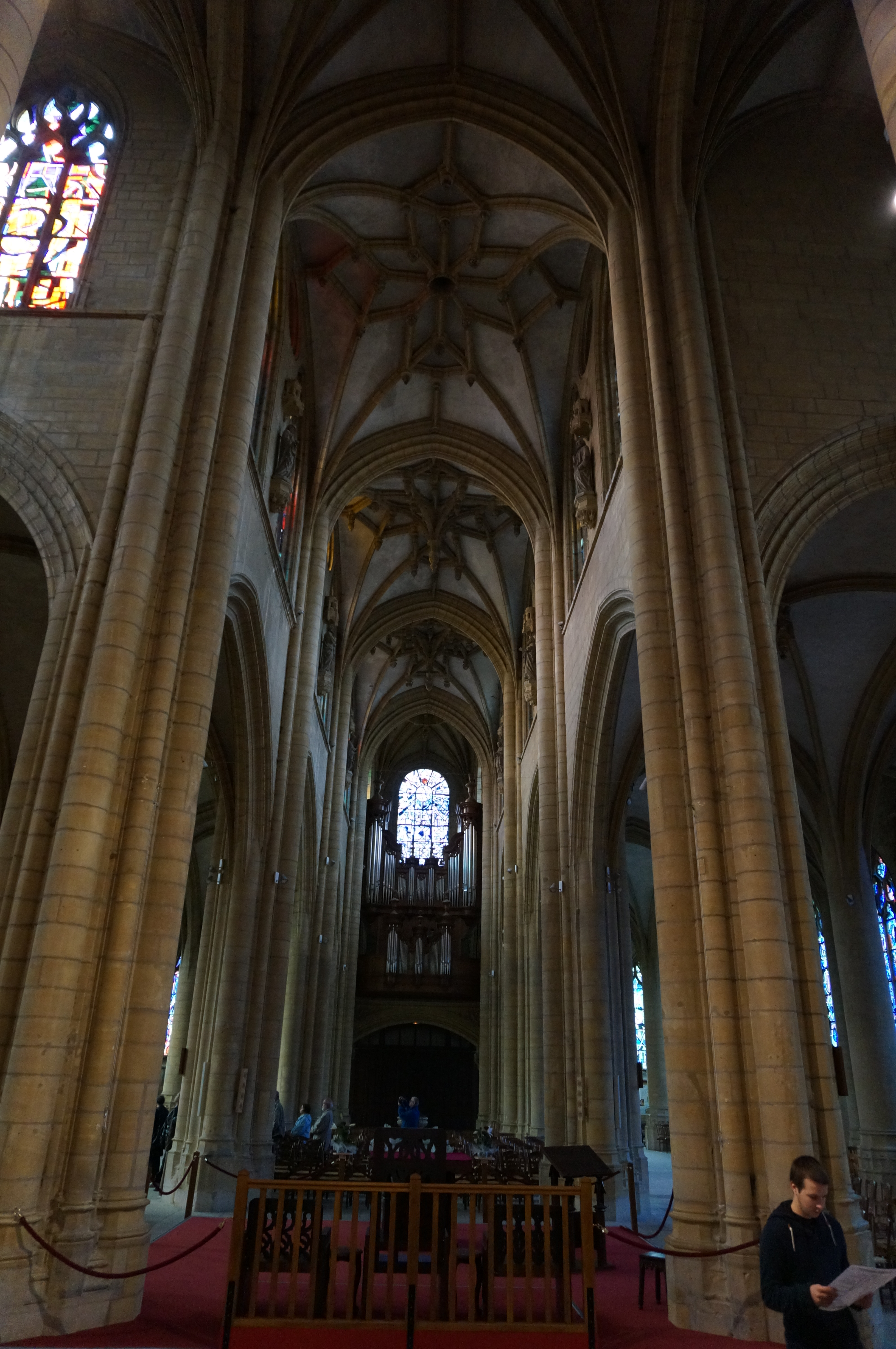 Vue de la nef vers le portail .